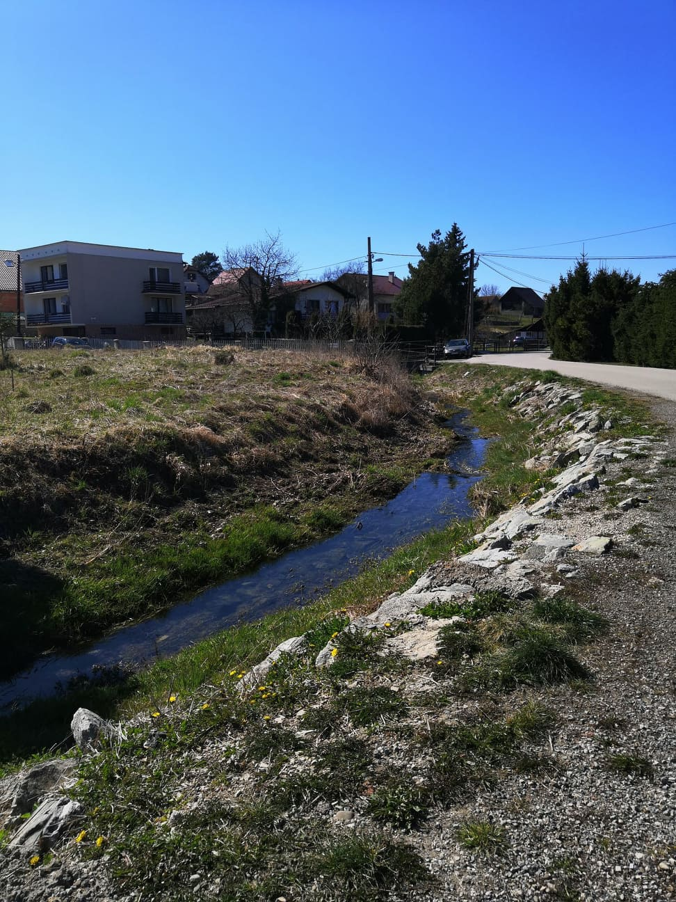 Potok v Trnovom